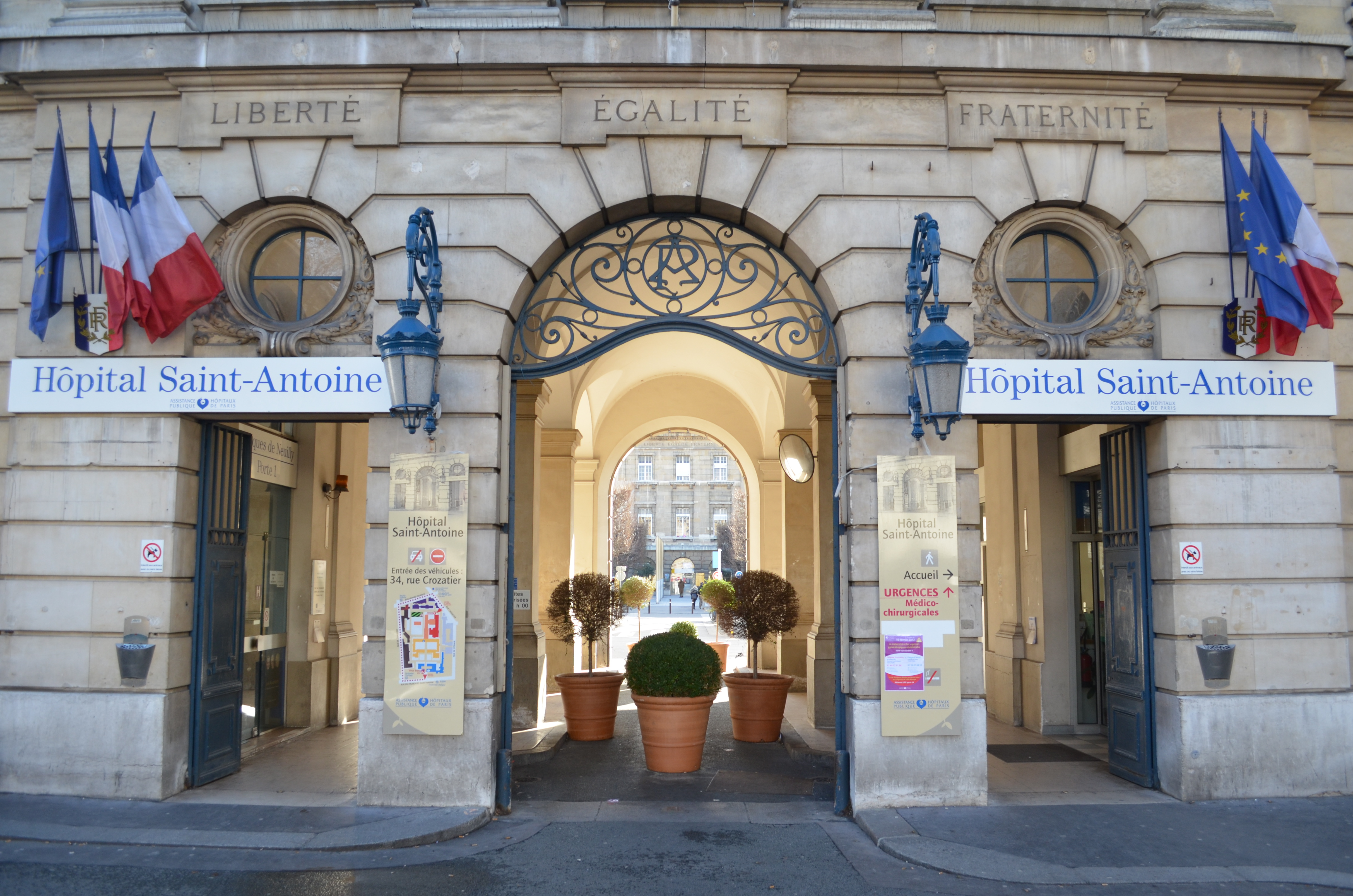 Principale façade de l'Hôpital Saint-Antoine - Paris 12e arrondissement